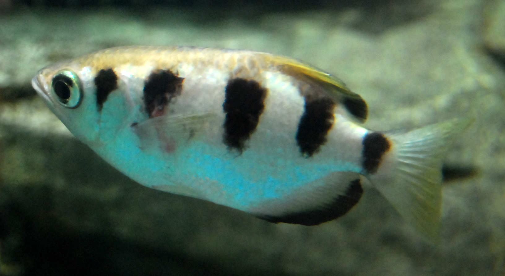 射水鱼，于北京海洋馆